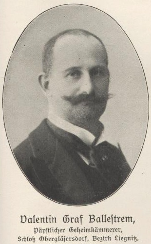 Valentin von Ballestrem (1860-1920), Unternehmer, Zentrumspolitiker, Mitglied des Preussischen Herrenhauses